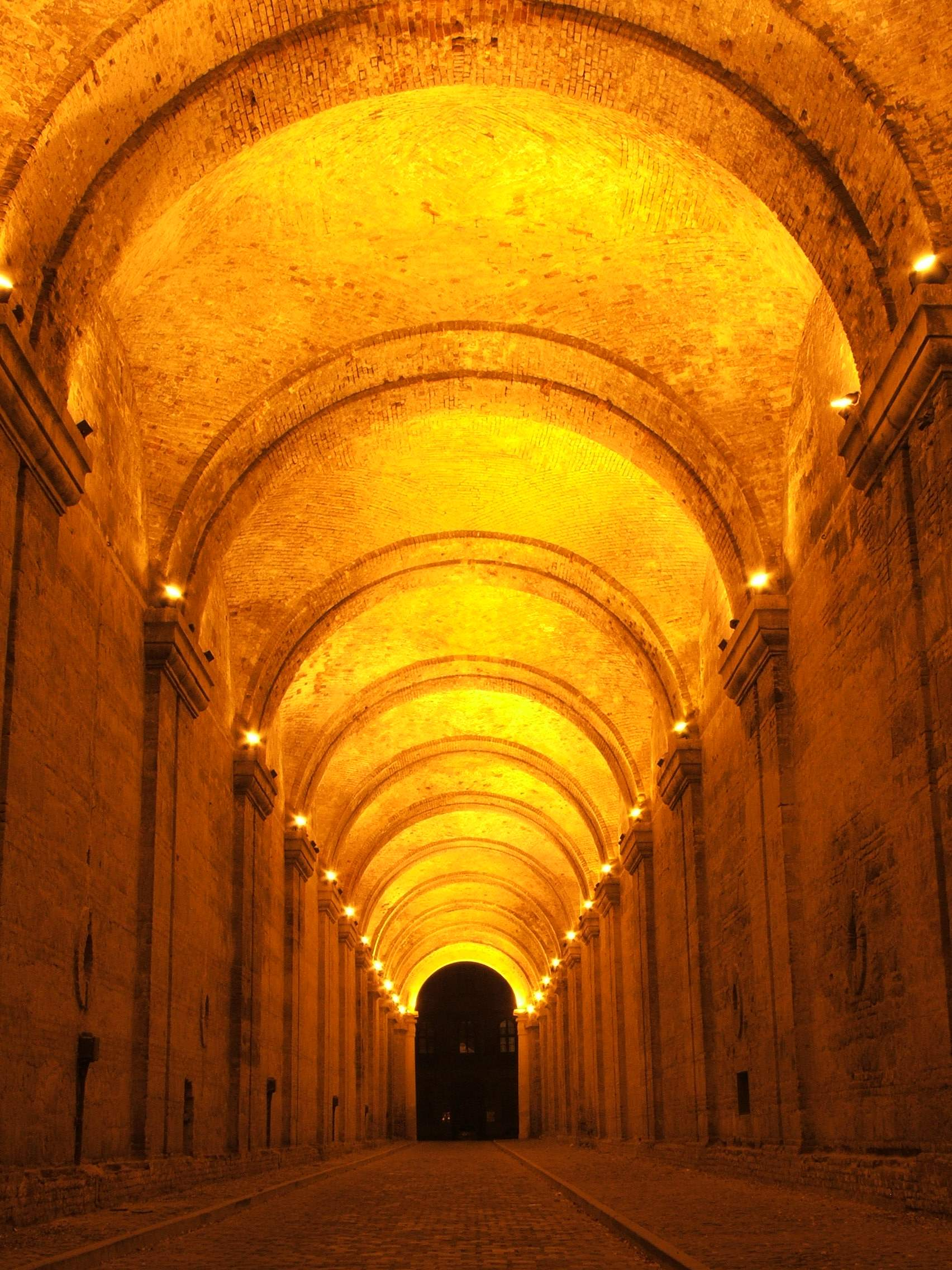 Sötétkapu, or "Dark gate" in Esztergom, Hungary.